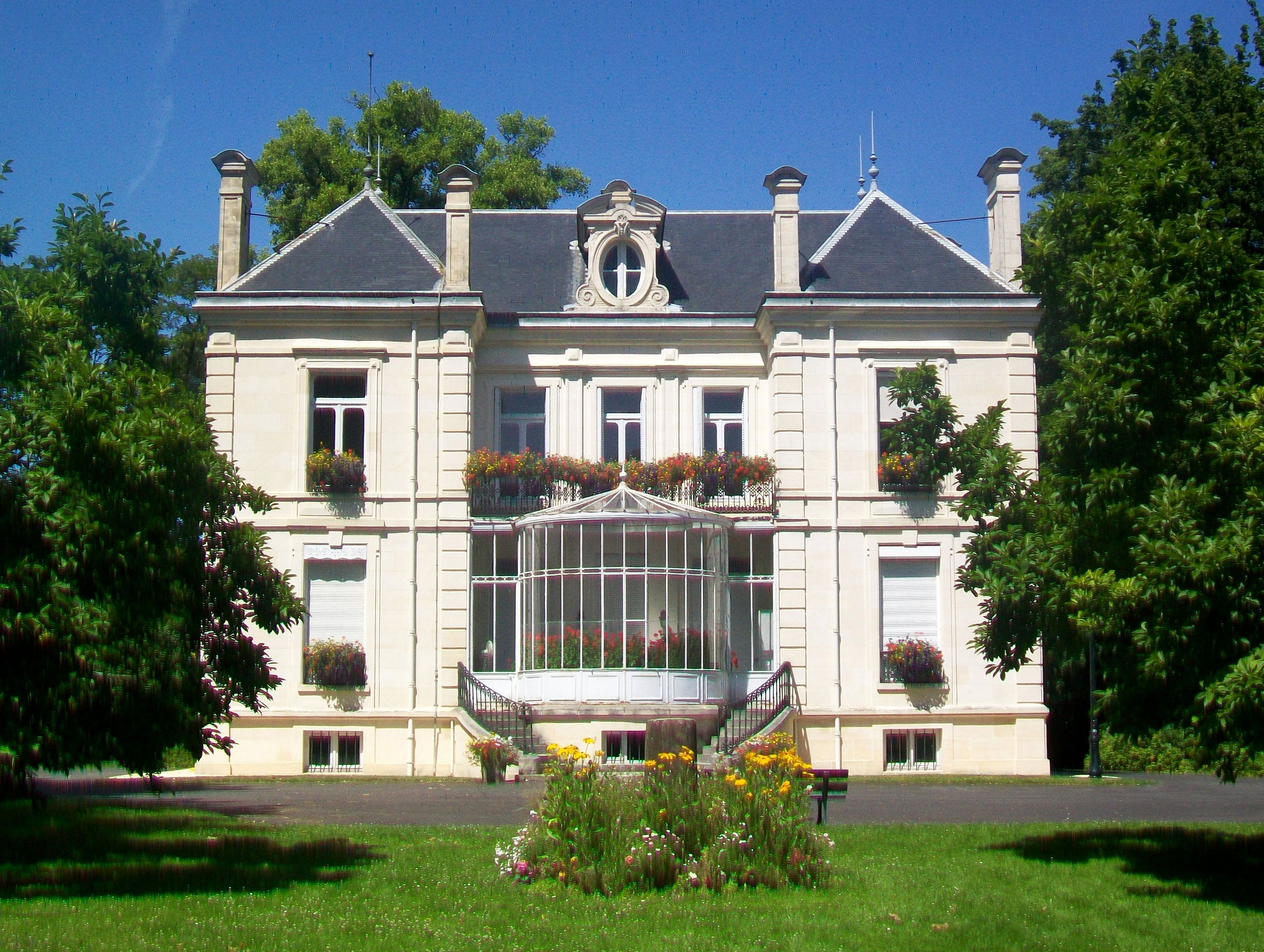 La mairie de Cauffry, façade sud ; au premier plan, une borne miliaire déplacée ici.